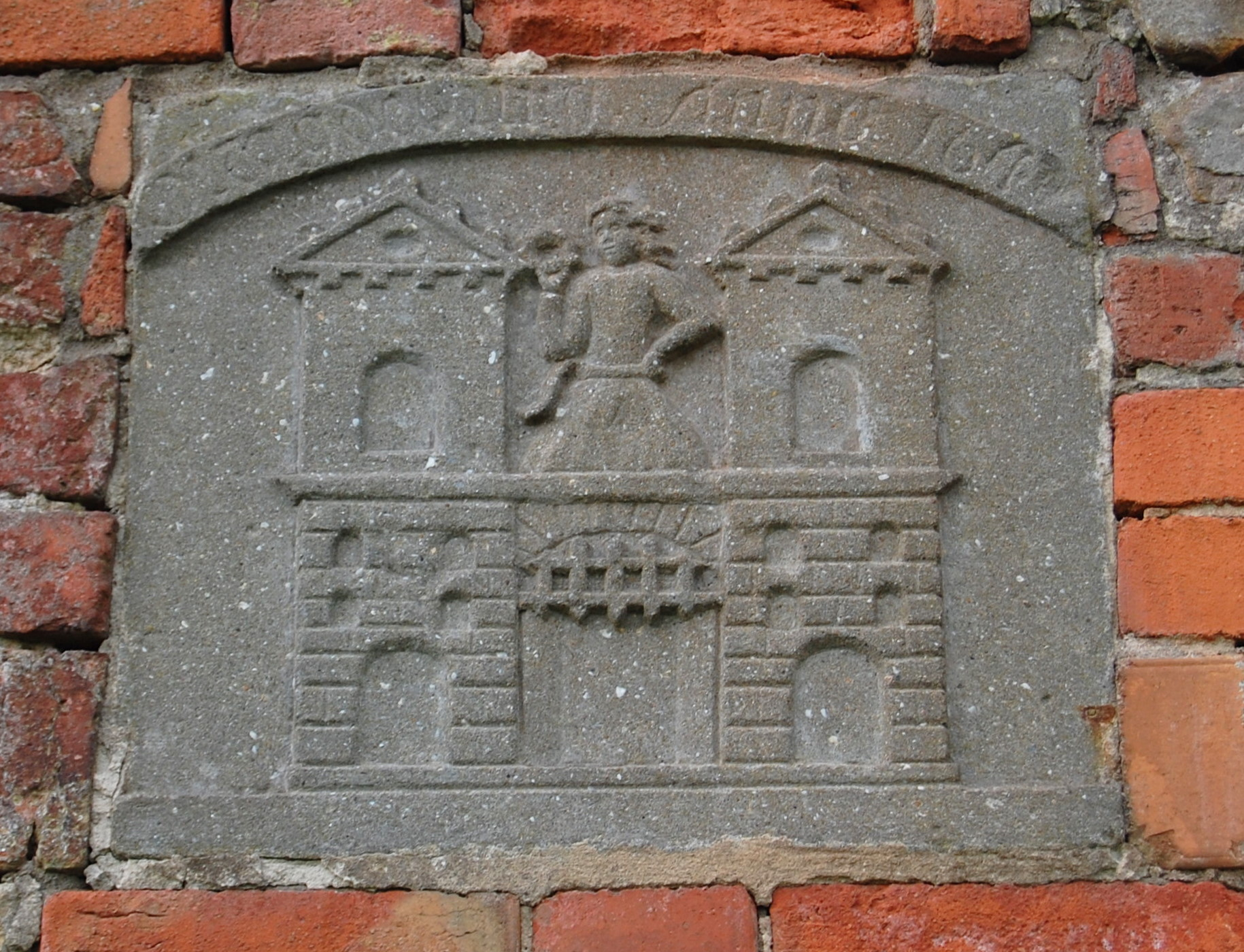 Magdeburger Wappen an der Klusbrücke